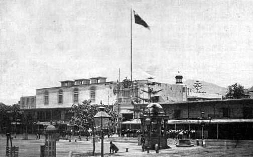 Fotografía del Palacio de Gobierno en Lima, Perú, durante la invasión chilena (1881)